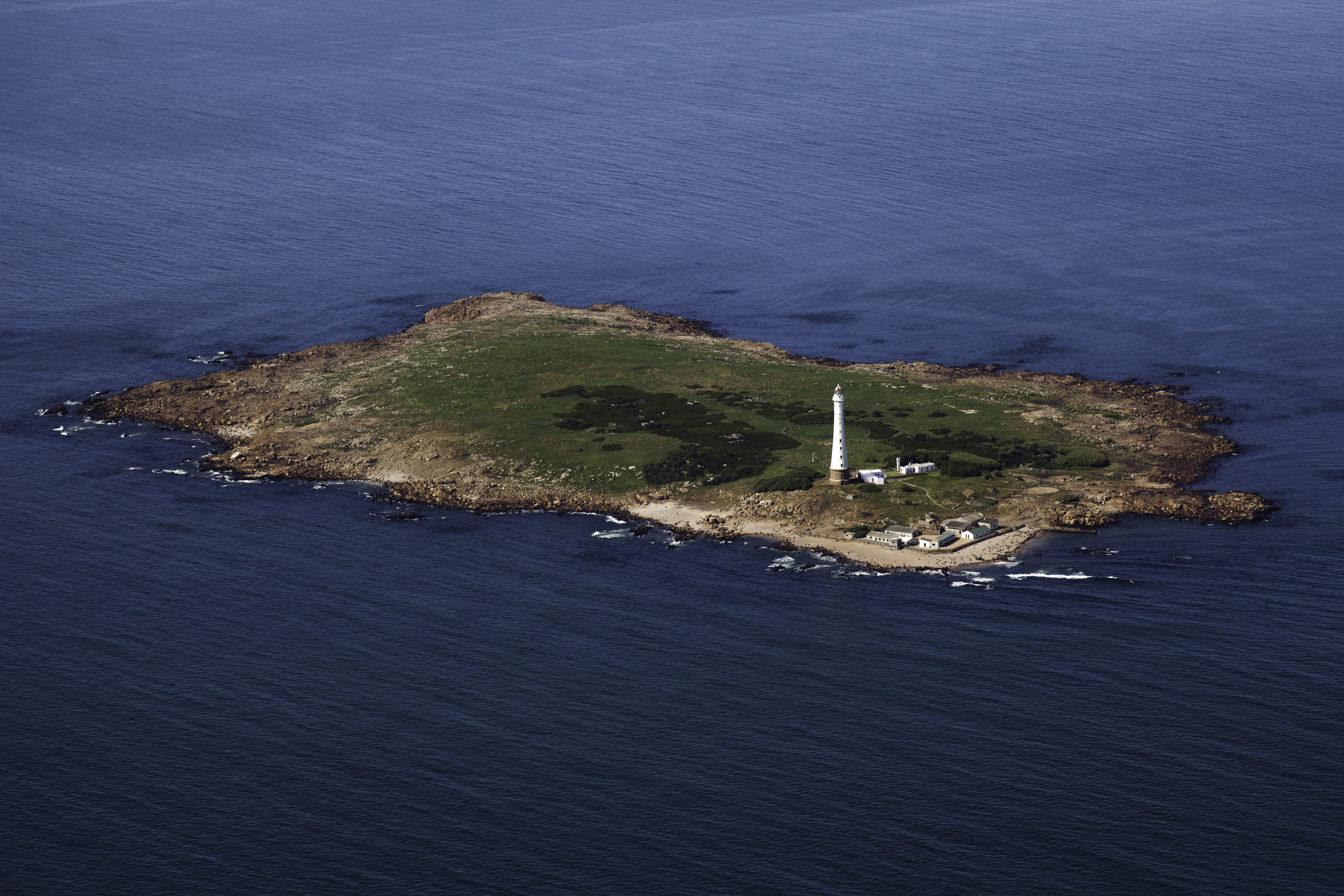 Vista áerea de la Isla de Lobos, Uruguay.